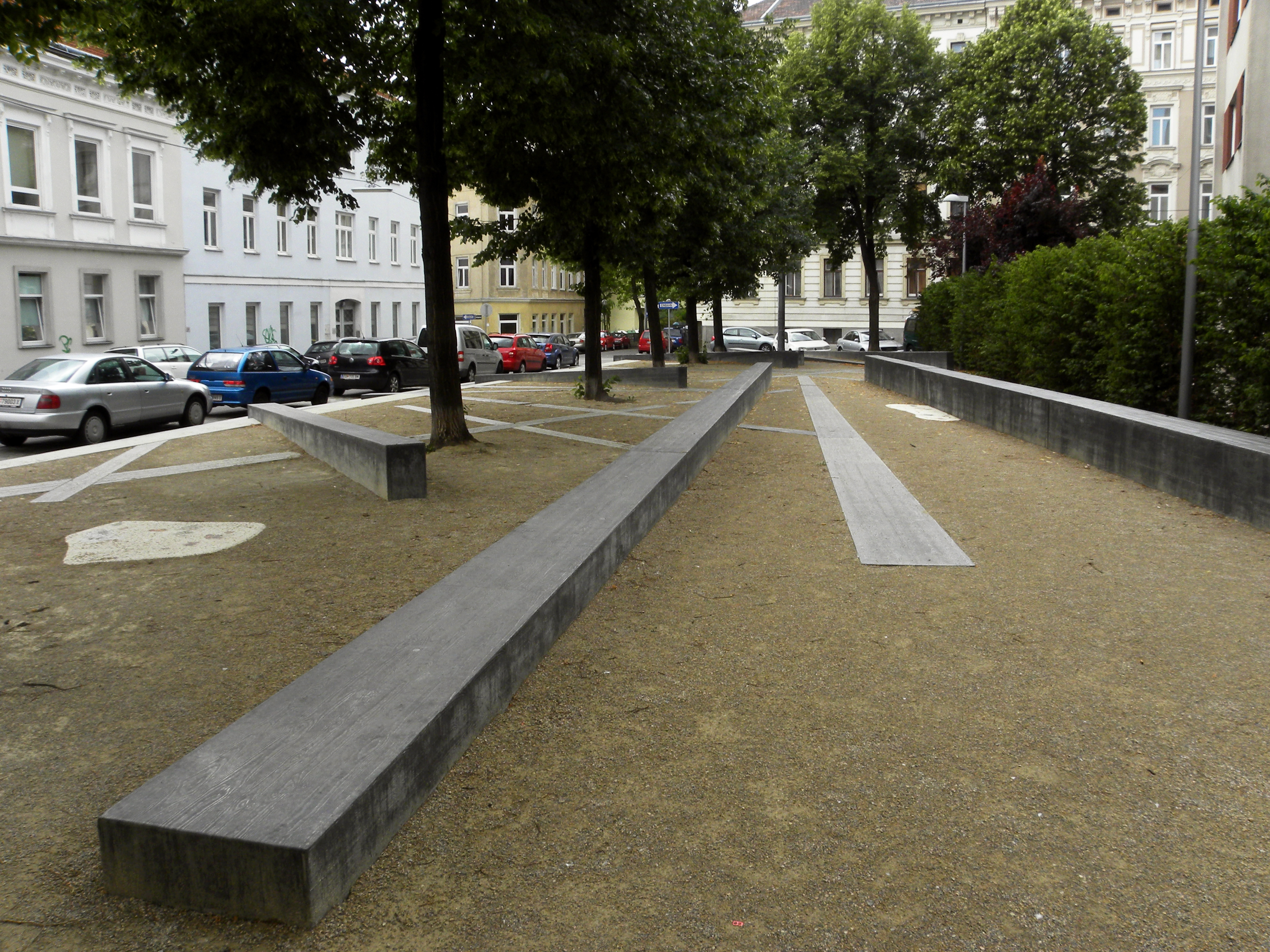 An dieser Stelle befand sich die 1871/72 errichtete Synagoge Turnertempel, bis sie 1938 in der Reichskristallnacht von Nationalsozialisten niedergebrannt wurde. Die beim Brand geborstenen Dachbalken sind symbolisch dargestellt, auf Mosaiken am Boden finden sich in der Torah erwähnte Früchte und Pflanzen.